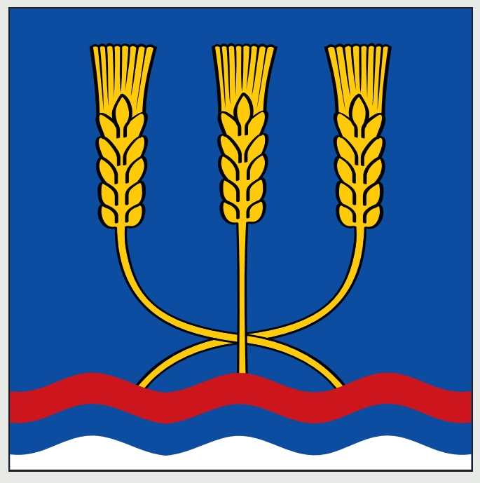 Застава општине Житорађа је квадратног облика са односом страница 1:1. На њој су представљени, на плавој основи, хералдички елементи: три кривудаве линије у црвеној, плавој и белој боји (боје заставе Р. Србије), којима је представљена река Топлица и три класа пшенице или жита, који симболизују пољопривреду наше општине као основну делатност становништва и који алудирају на име општине. Графичко решење знамења Општине Житорађа урадио је Љубиша Стевановић из Житорађе, радник Општинске управе општине Житорађа, уз стручну помоћ Ивана Сарајчића. Застава је званично усвојена на седници Скупштине општине Житорађа, дана 15.10.2010. године. Употреба је регулисана Одлуком о употреби имена, грба и заставе општине Житорађа.